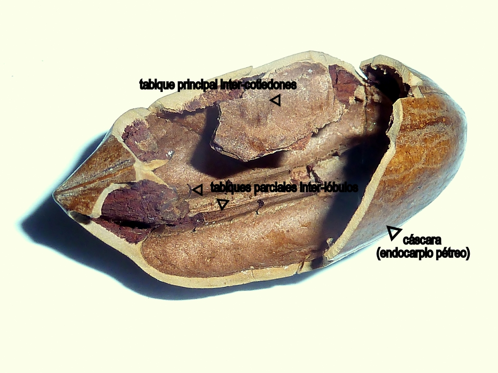 Carya illinoinensis (Nuez de Pecán) - Trima abierta sin su epicarpio ni mesocarpio, con el tabique principal de separación inter-cotiledones y el doble tabique parcial perpendicular al cotiledón. - Comercio, procedencia desconocida, Madrid (España).